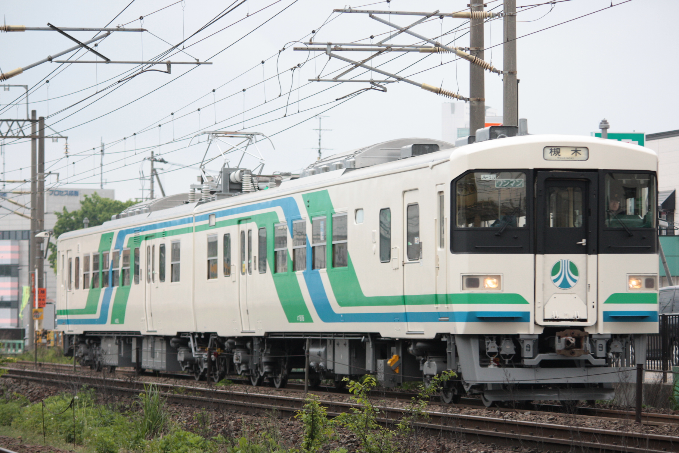 阿武隈急行8100系電車